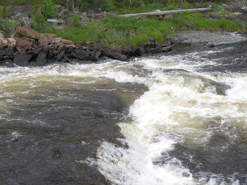 Voxnan